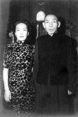 中文（台灣）: 孟小冬杜月笙1950年在香港的結婚照